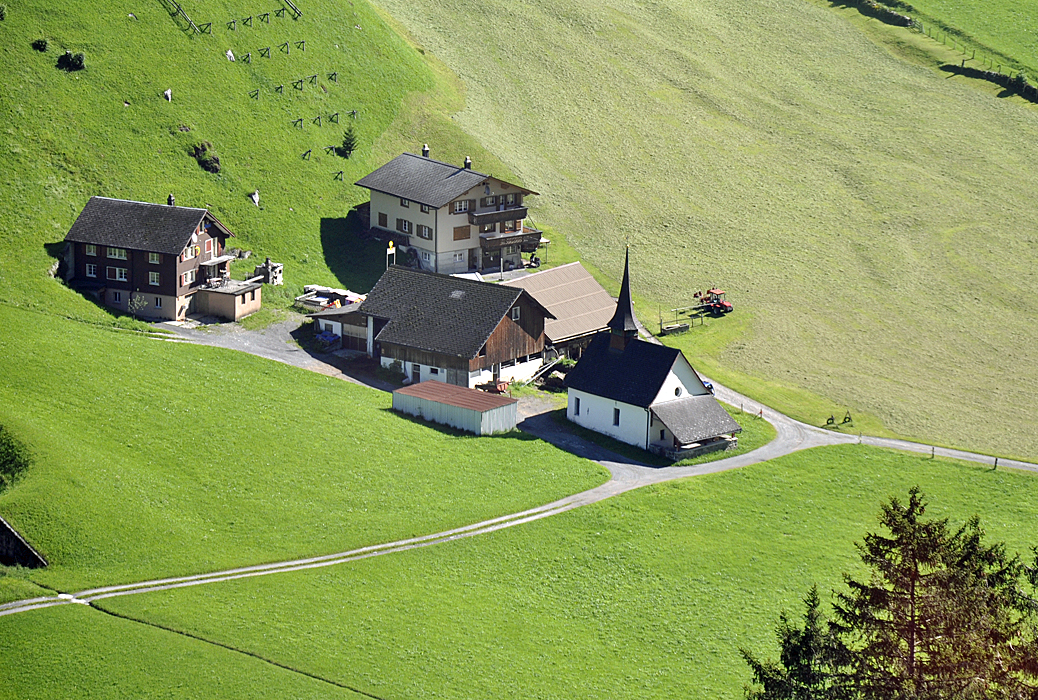 Der Weiler Schwanden bei Unterschächen